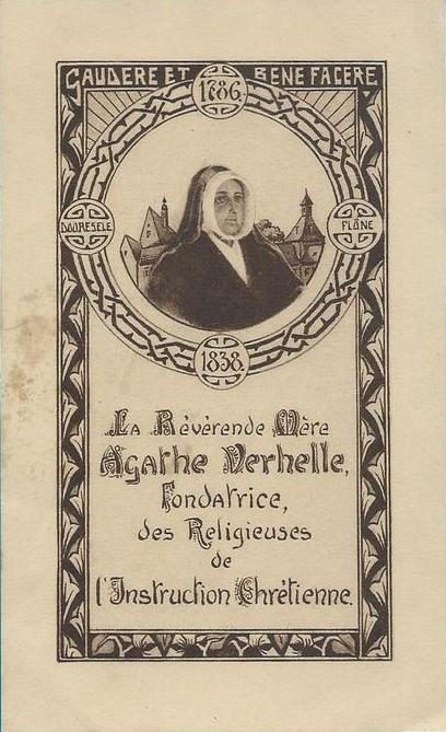 Bidprentje